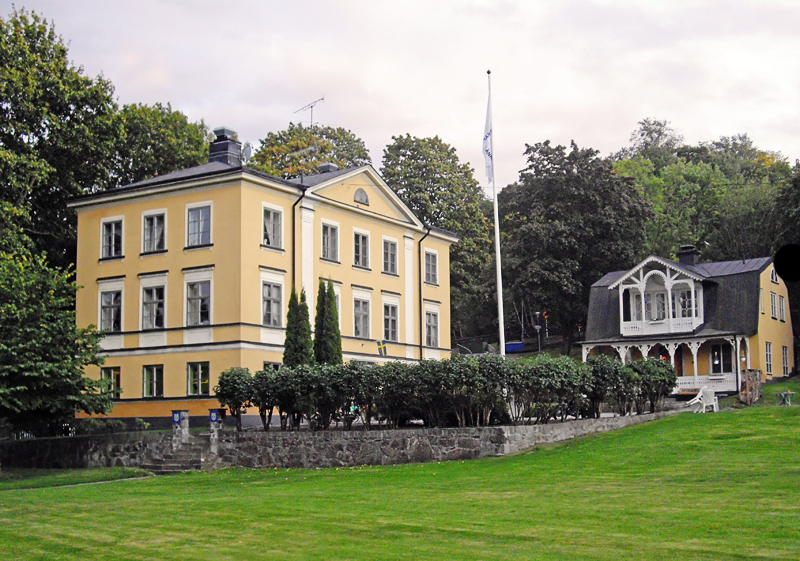 Mariedal på Kungsholmen i västra Stockholm.